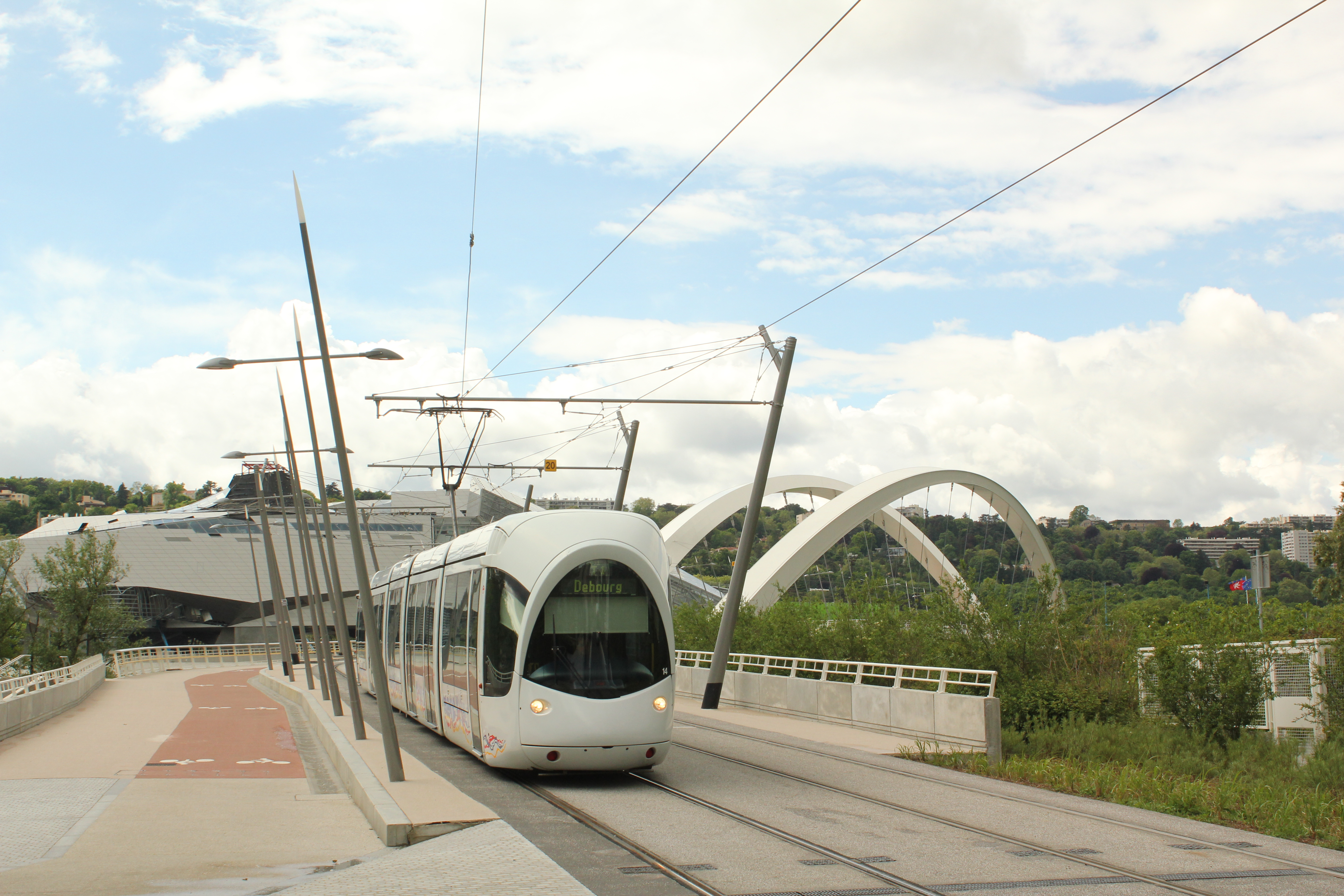 La rame n°814 de la Ligne T1 du réseau TCL (Lyon) arrive à la station « Halle Tony Garnier » après avoir franchi le Rhône grâce au Pont Raymond Barre, réservé au tramway, piétons, et cyclistes.